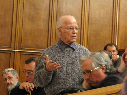 Профессор мехмата МГУ Владимир Зорич на заседании Московского математического общества.